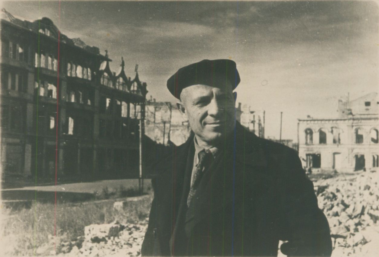 Это фотография человека умершего в 1958 году. Зименков Иван Фёдорович участник Сталинградской битвы, член Сталинградского Городского Комитета Обороны, один из руководителей Сталинграда в годы Второй Мировой Войны.